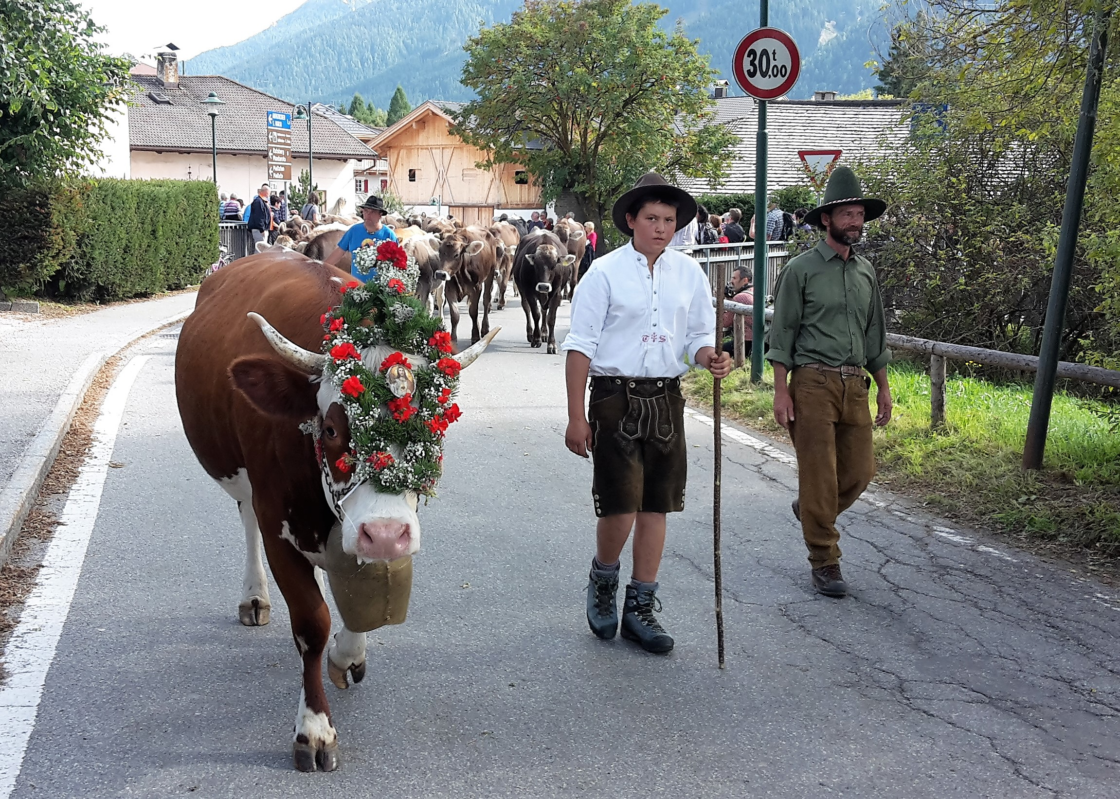 Almabtrieb in Toblach 2017